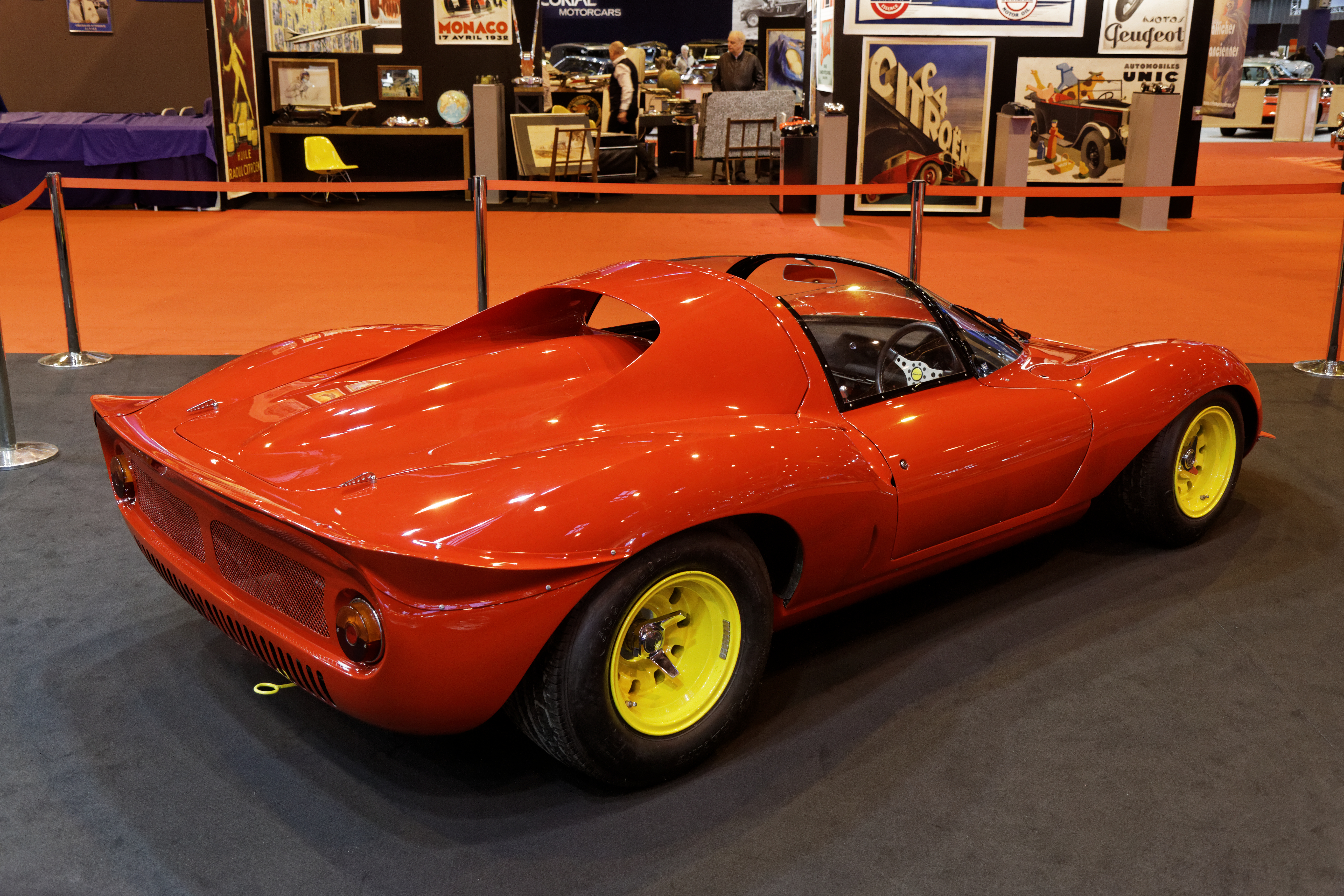 Une Dino 206 SP présenté lors du salon Retromobile 2014.